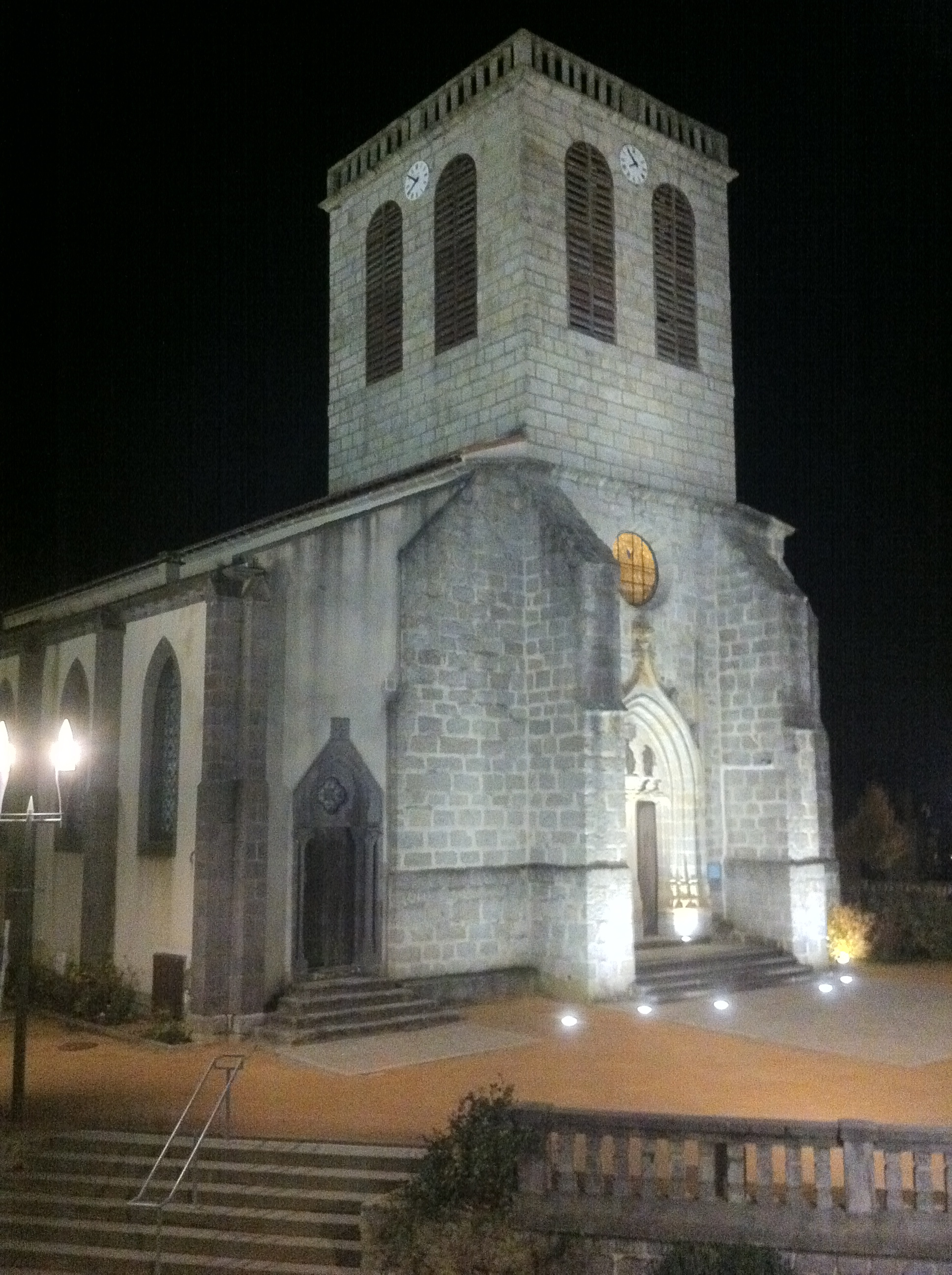 Vue de l'église de SAINT REMY SUR DUROLLE